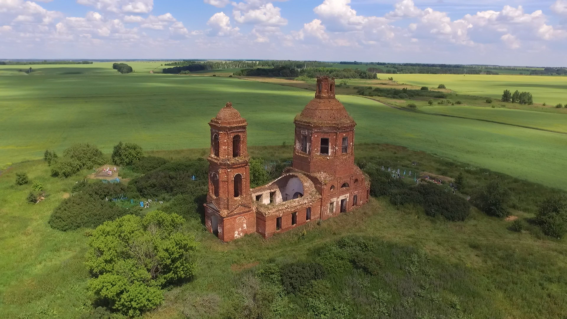 Церковь Богоявления: Спасское Чириково, Липецкий район, Липецкая область